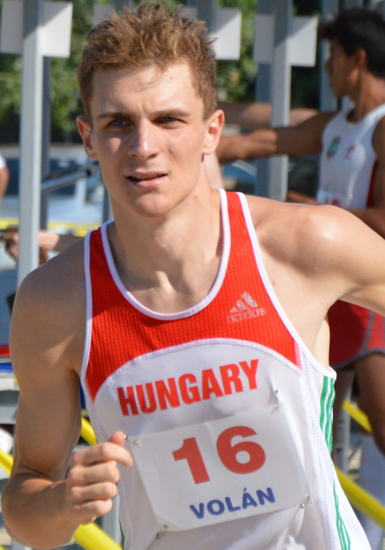 Harangozó Bence öttusázó